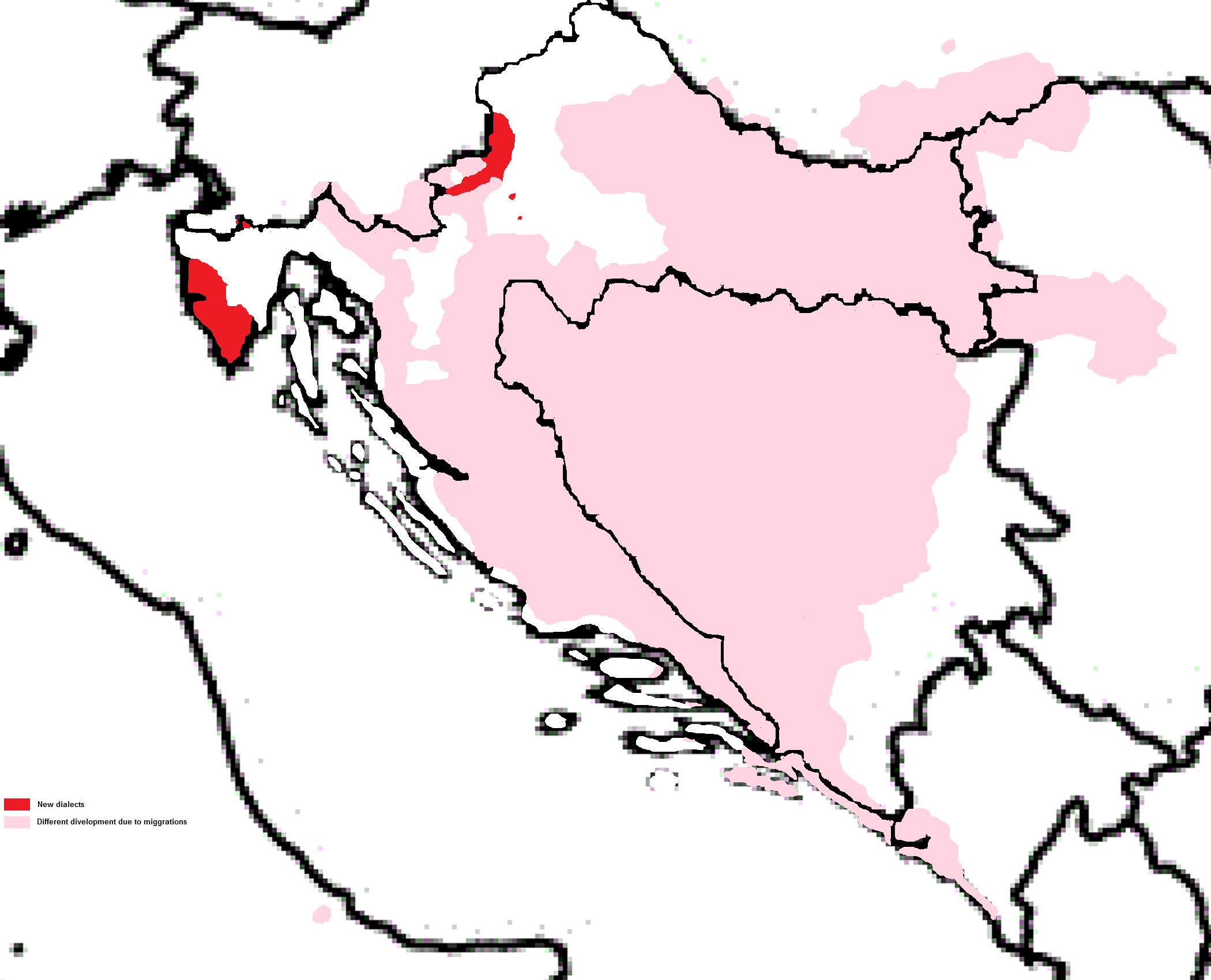 Dijalektalne promjene u hr dijalektima prouzrokovane turskim migracijama Crveno su novi/jako promijenjeni dijalekt, a ružičasto su dijalekti kojima je promijenjen razvoj radi migracija u vrijeme Turaka